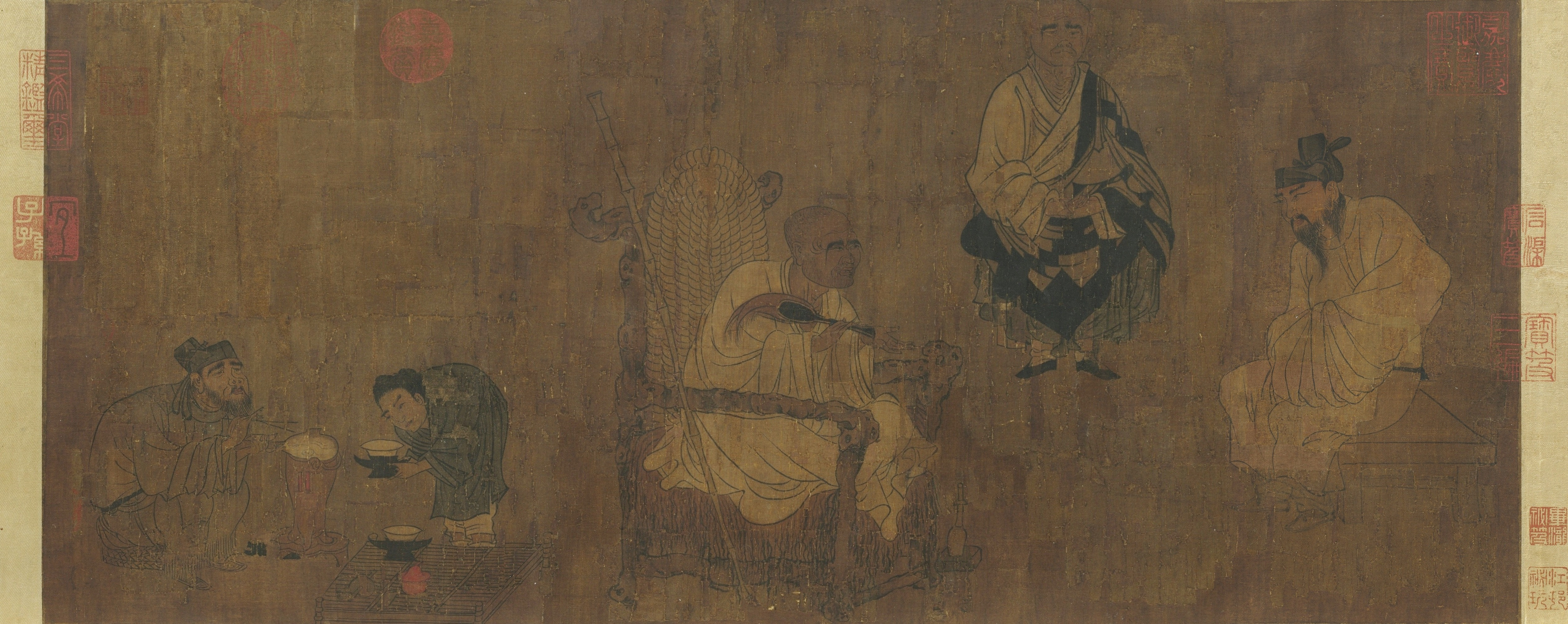 唐 閻立本 蕭翼賺蘭亭圖Yan Liben. Xiao Yi trying to swipe the lanting scroll. National Palace Museum, Taipei. Song copy of Tang scroll.